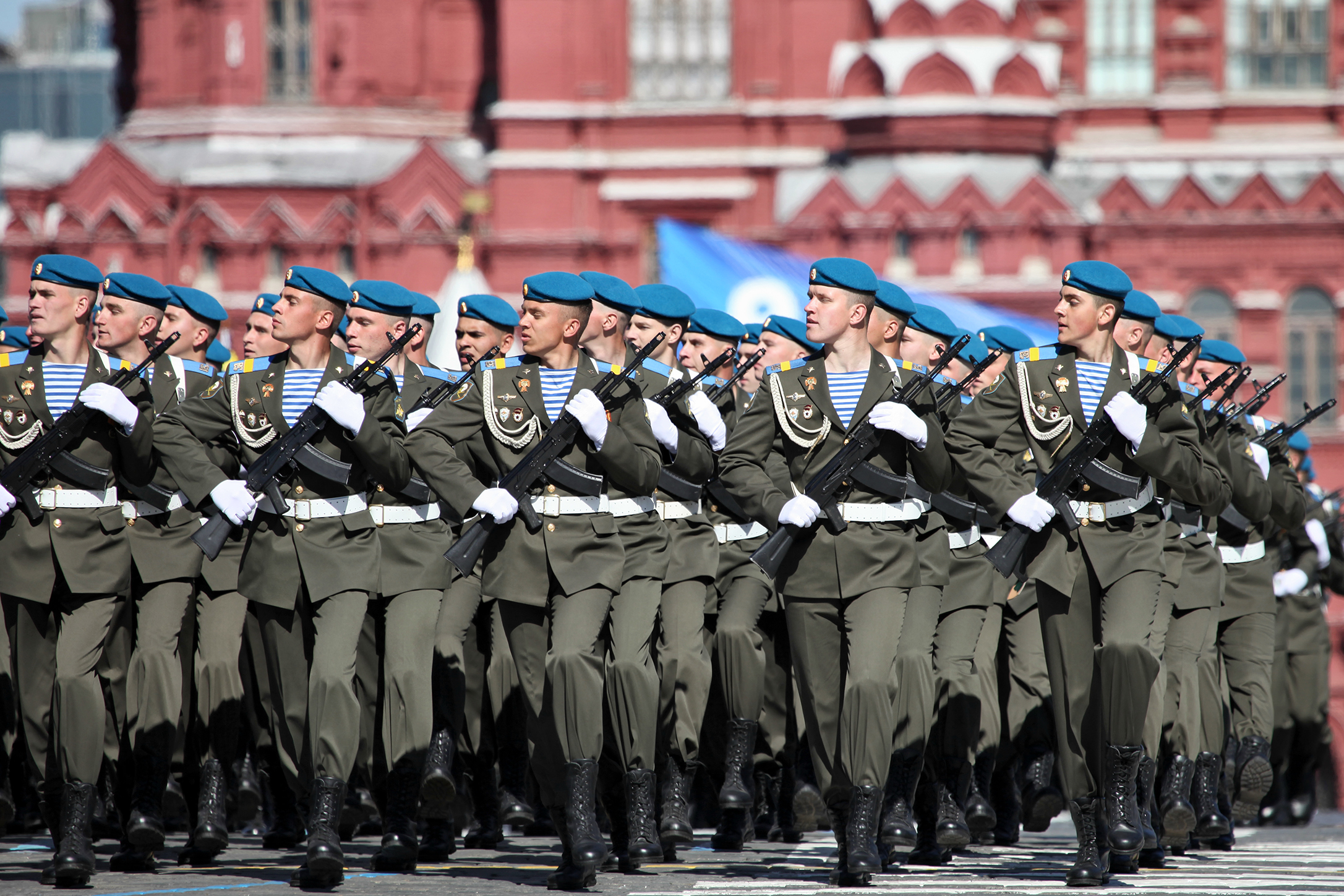 217-й ПДП 98-й ВДД (217th Guards Airborne Regiment of 98th Guards Airborne Division)